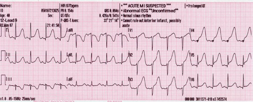 Rhythm Generated